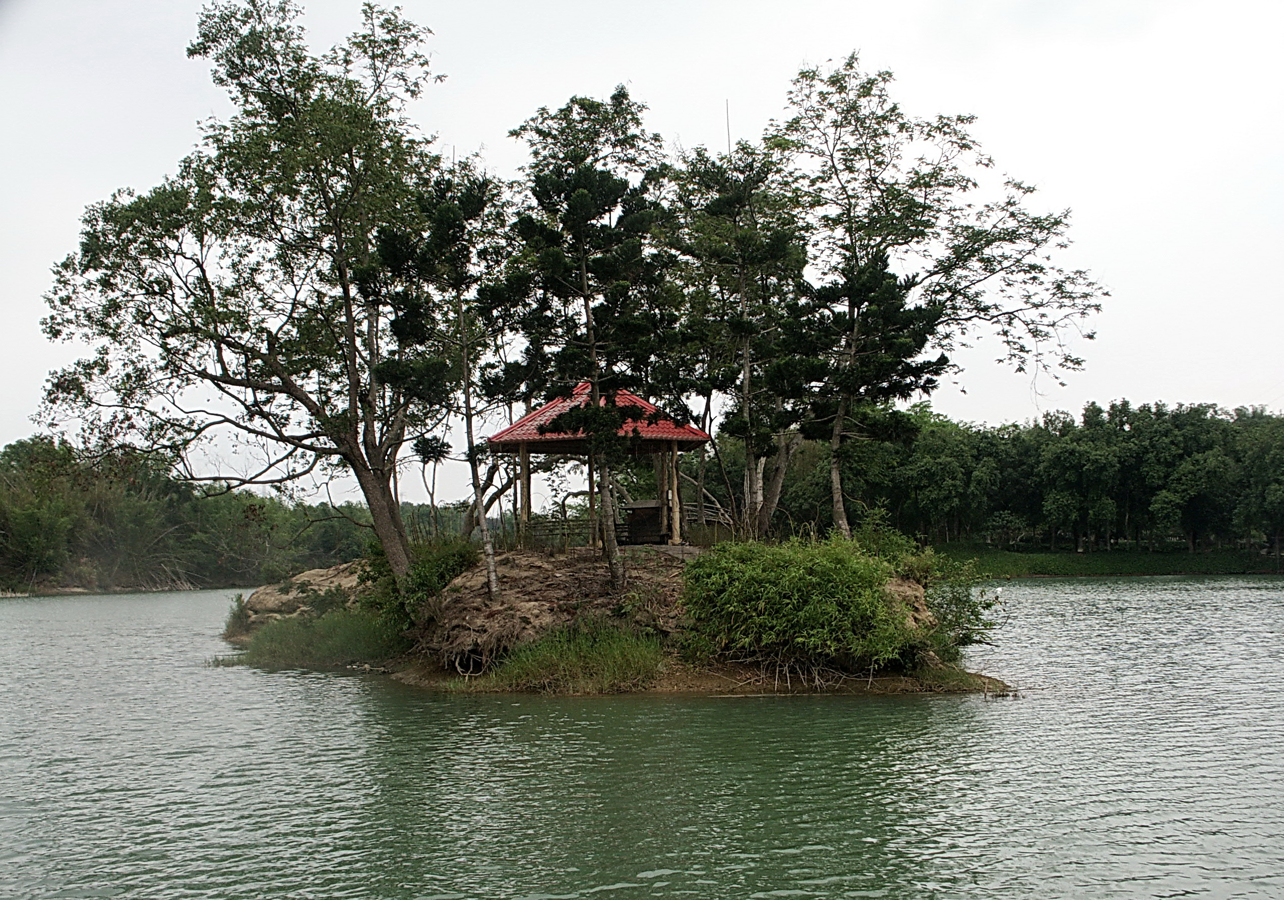 江南渡假村 Jiangnan Resort